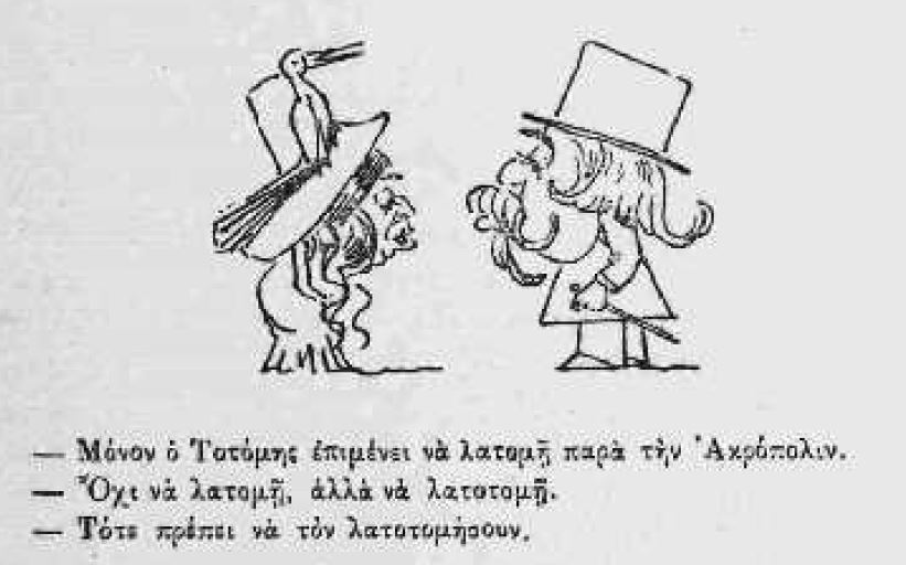 Γελοιογραφία στην εφημερίδα Άστυ του 1888, όπου εμφανίζεται διάλογος της Ανθούσας Ρουζού και του Ιωάννη Πύρλα, ΑΣΤΥ αρ. φύλλου 122, 24 Ιαν. 1888, σελ. 7 (εμφανίζεται και στην 192β του βιβλίου Αι Αθήναι από του 19ου εις τον 20ον αιώνα, Κώστας Ε Μπιρής, Εκδ. Οίκος Μέλισσα, 1995